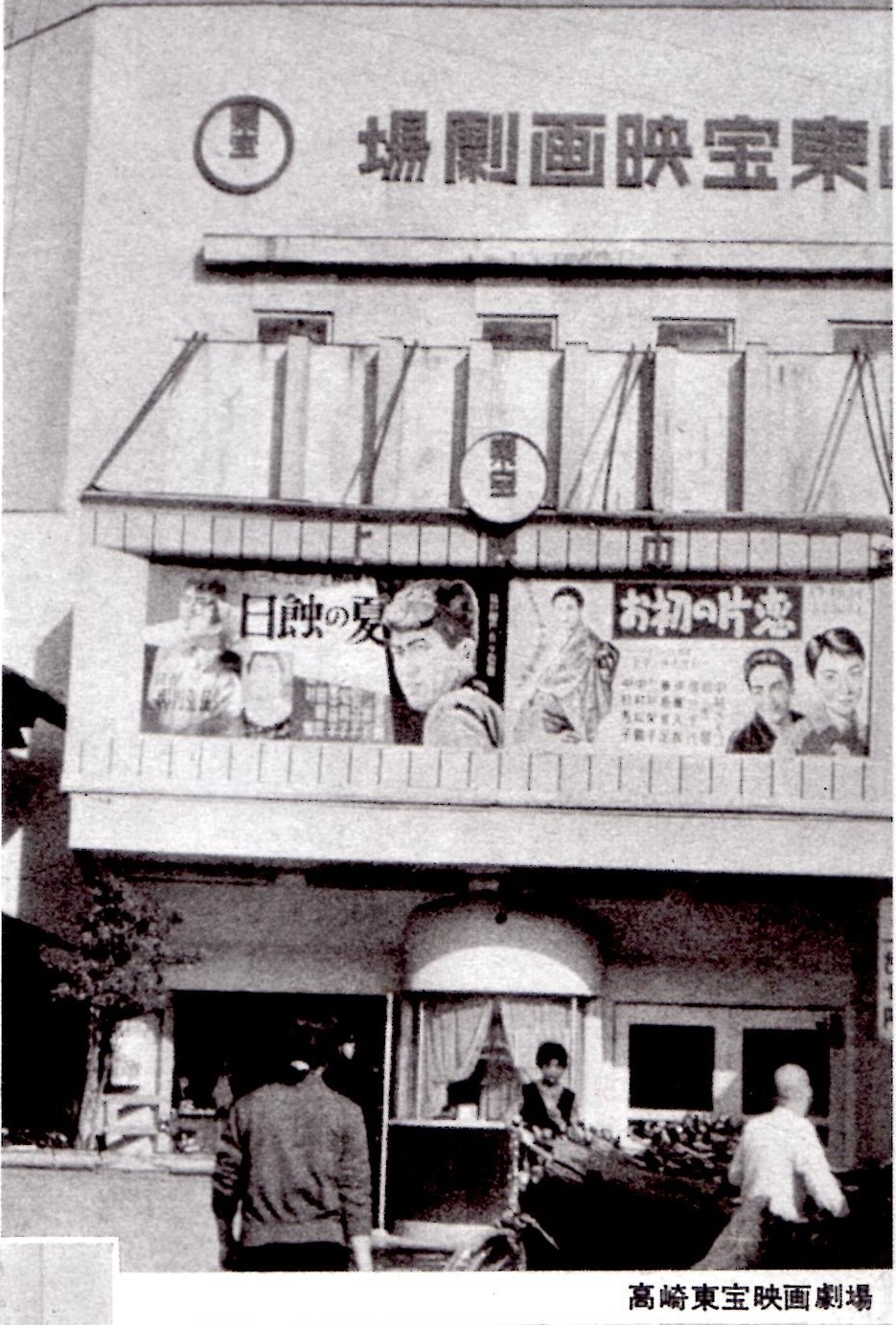 群馬県高崎市の映画館「高崎東宝映画劇場」。